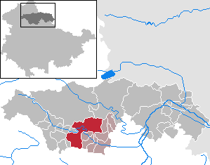 Großenehrich in Thuringia - Kyffhäuserkreis